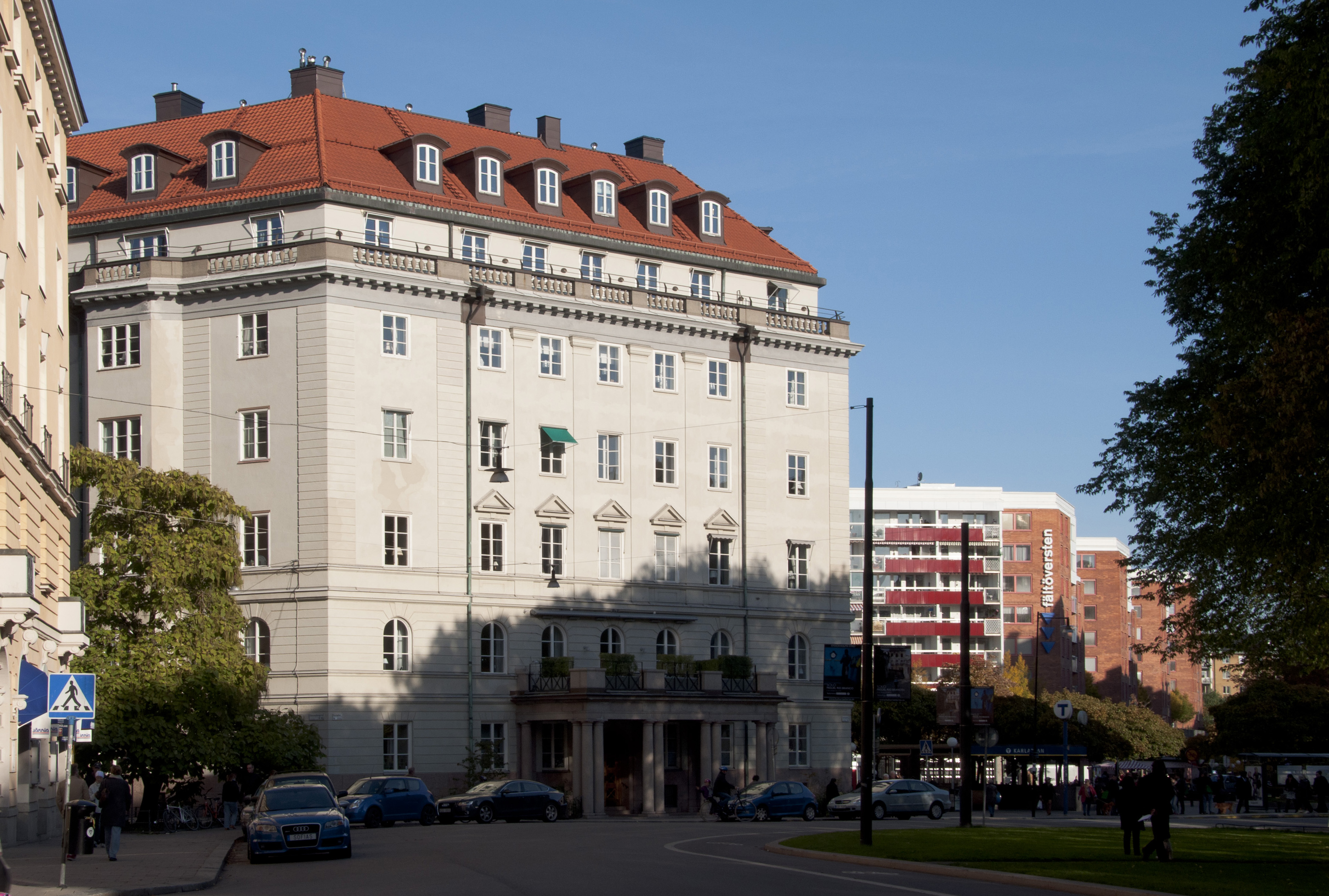 Djursborg 11, Karlaplan 9, Östermalmsgatan 103, Byggnadsår 1921-24, arkitekter Höög & Morssing, byggherre N J Bengtsson.